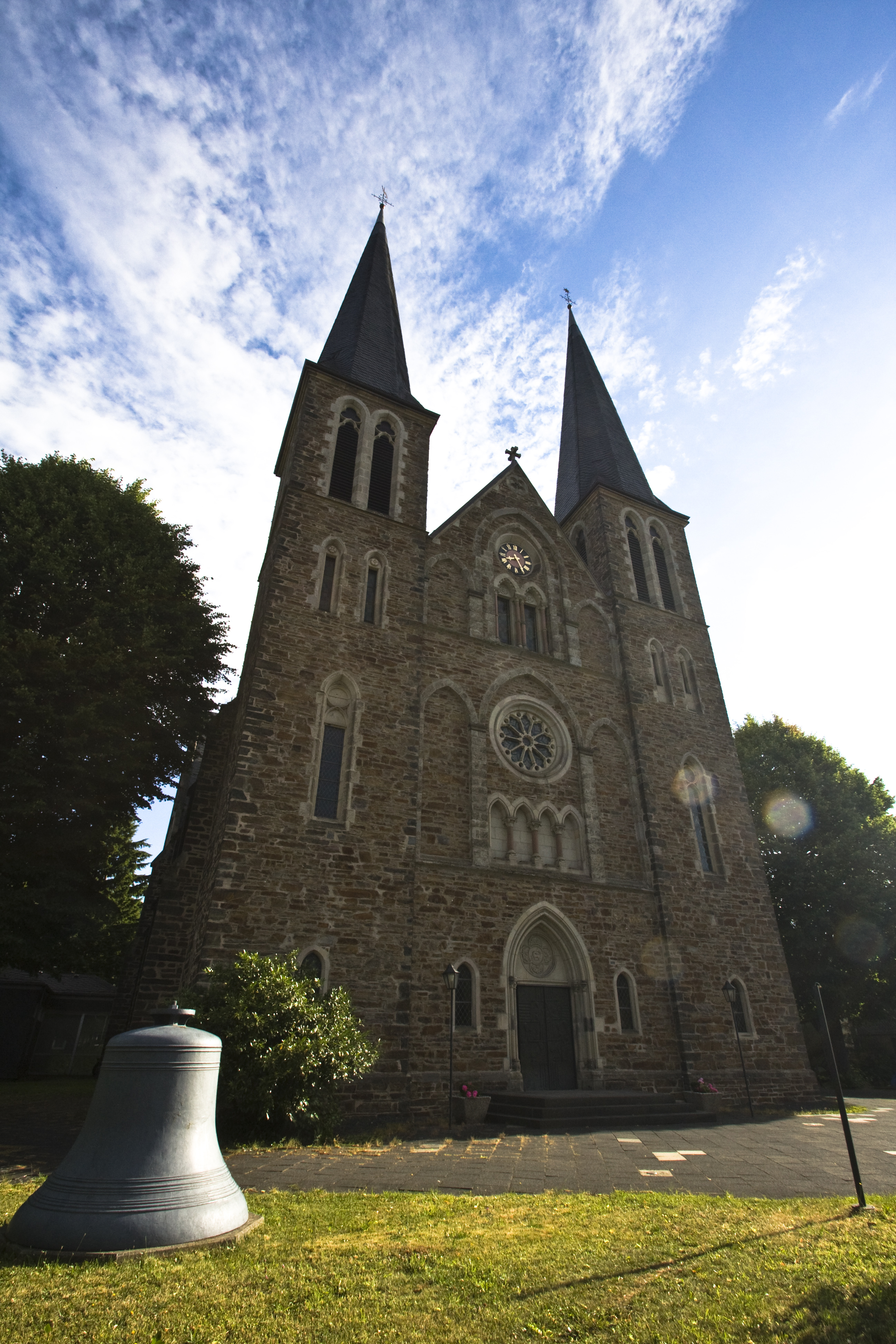 Frontseite der Kirche St. Martin Netphen